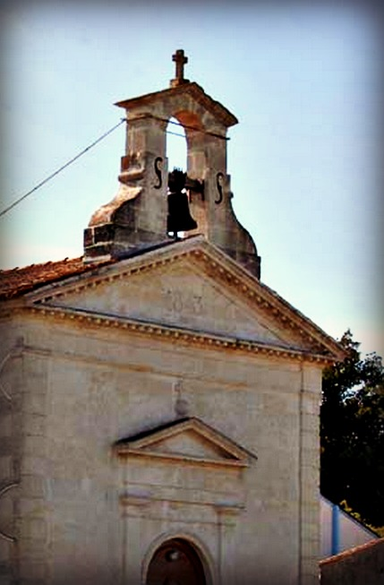 Façade de l'église de Saint-Augustin en Charente-Maritime.